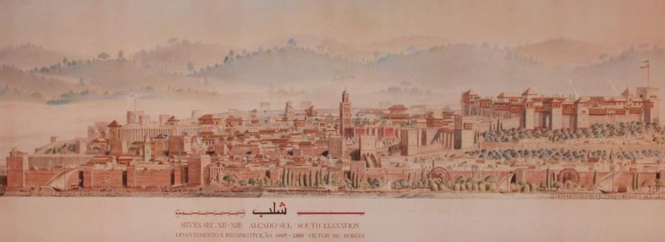 Painel de Victor Borges, com uma reconstituição de Shelb (Silves) em 1230